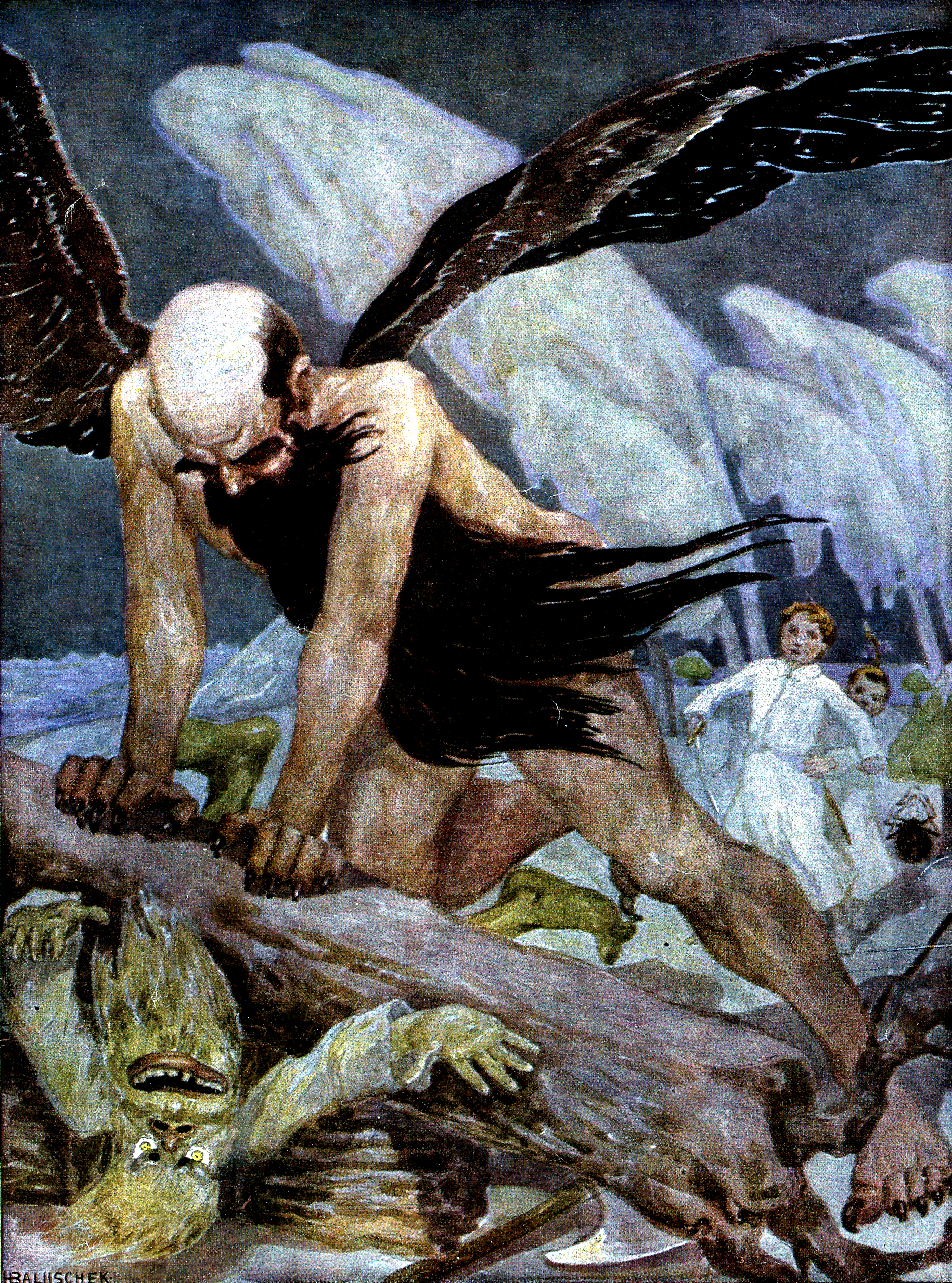 Der Kampf mit dem Mondmann, engl. The Battle with the Man on the-Moon, Illustration von Hans Bartuschek, Verlag Hermann Klemm.JPG